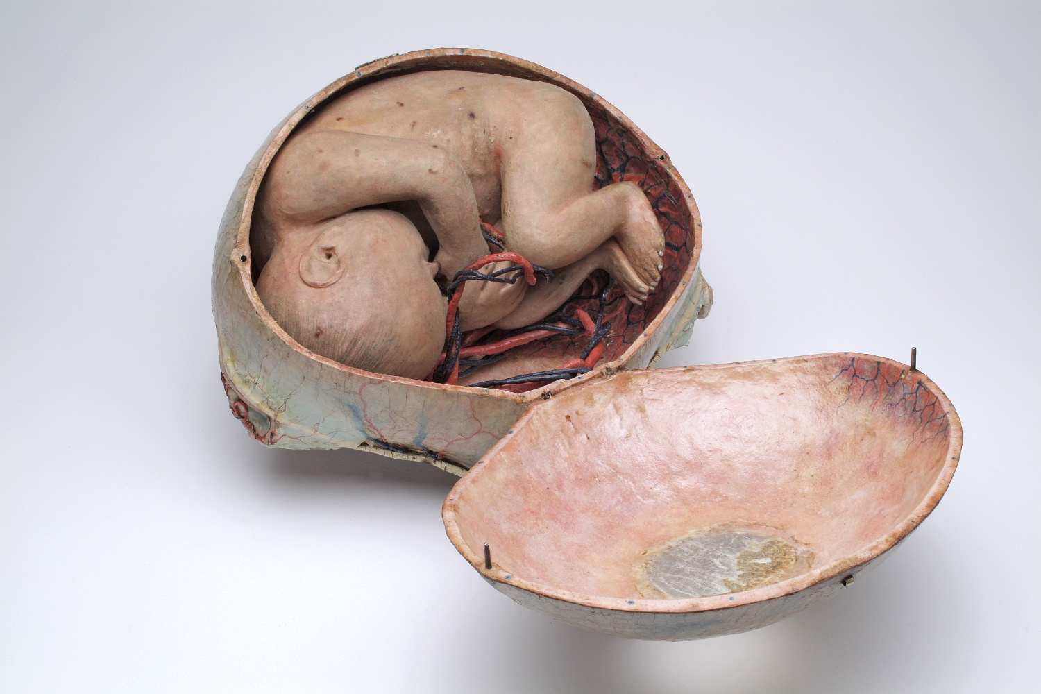 Zwangerschapsmodel papiermache van Auzoux inv nr 31932